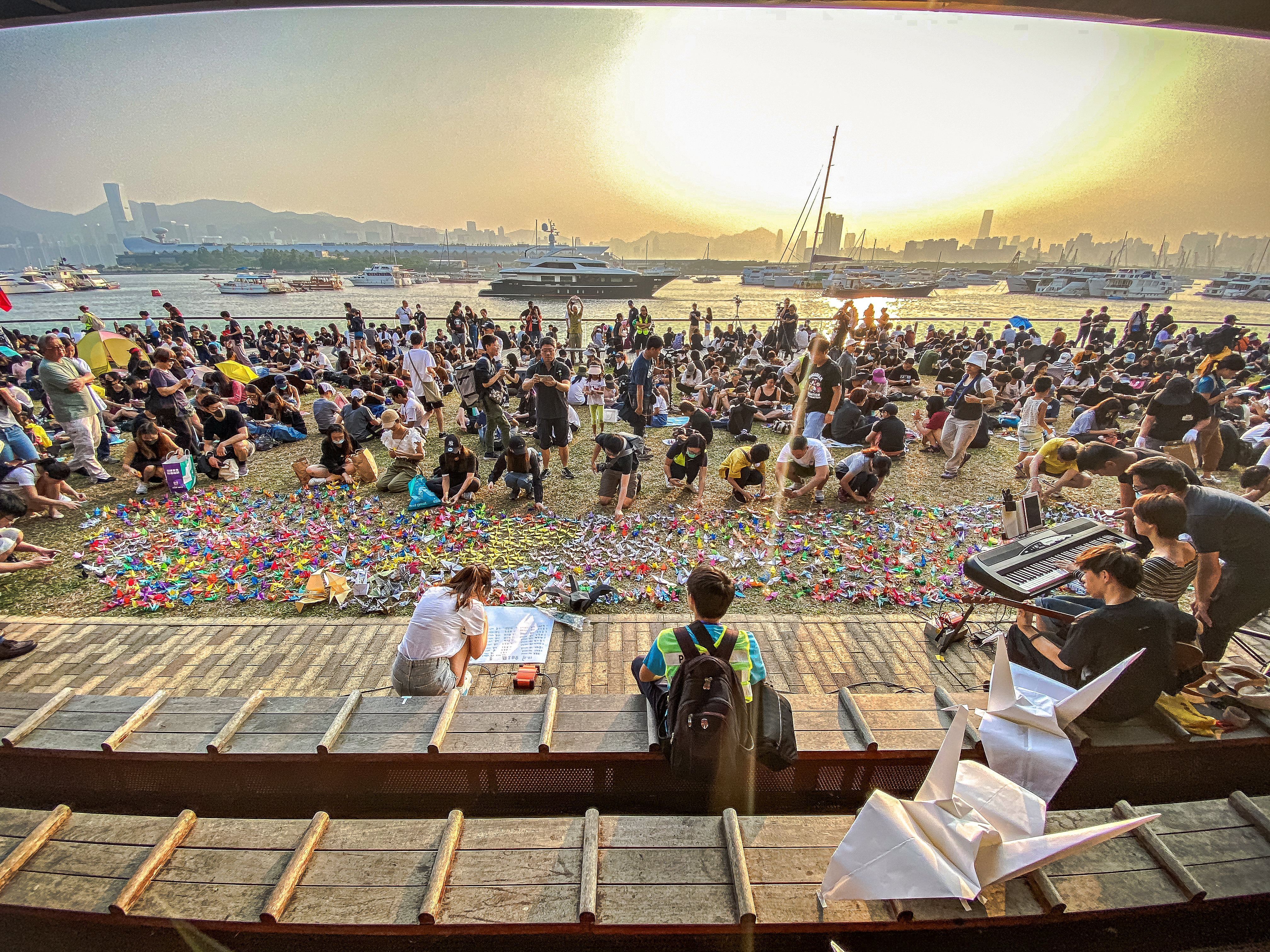 觀塘海濱花園「觀塘自由紙鶴」活動